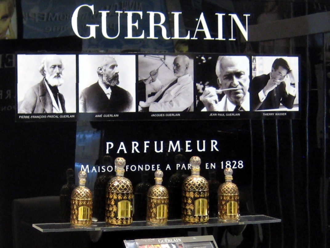 СТенд Герлен. Москва